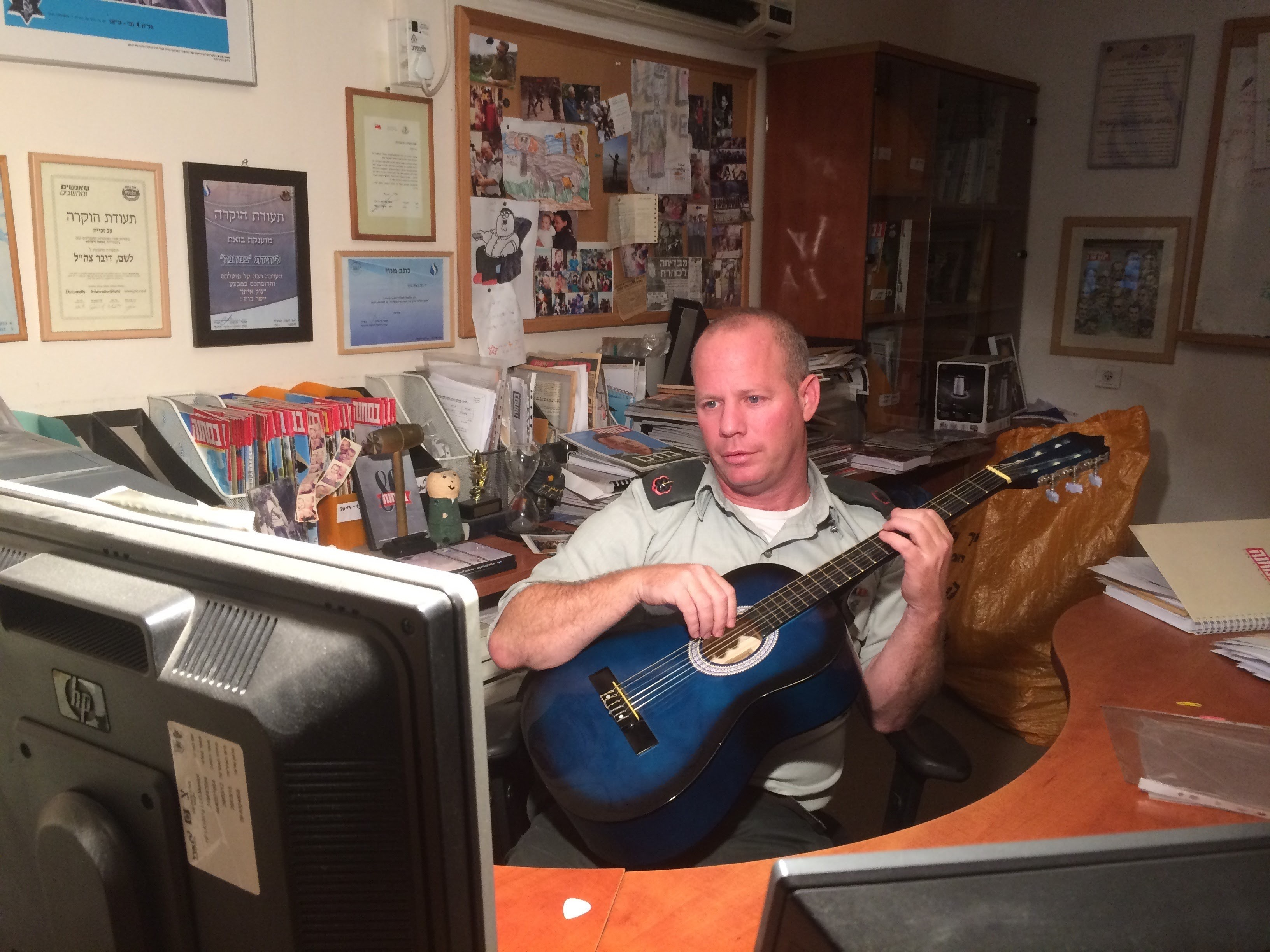 צחי בירן בצילום במערכת במחנה 2016